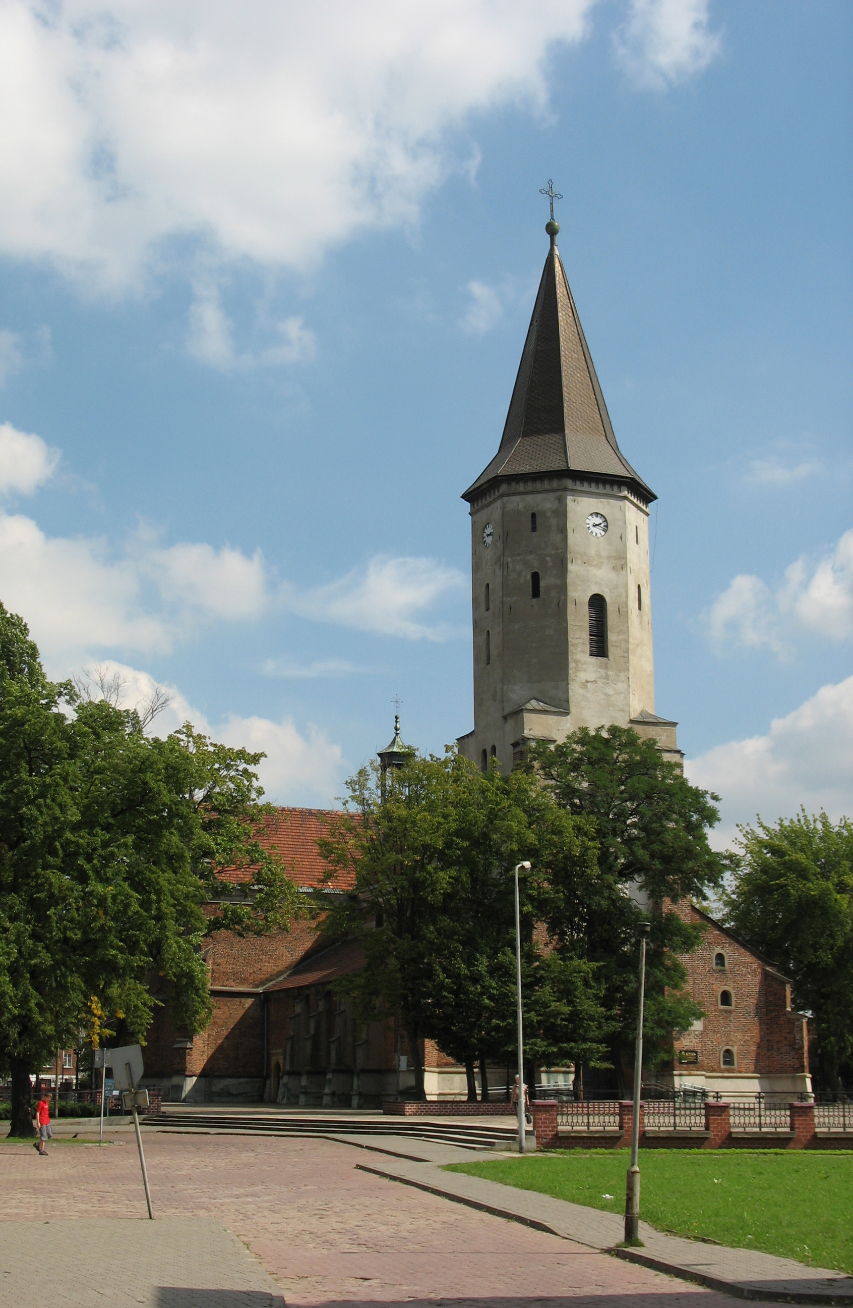 Kościół św. Mateusza